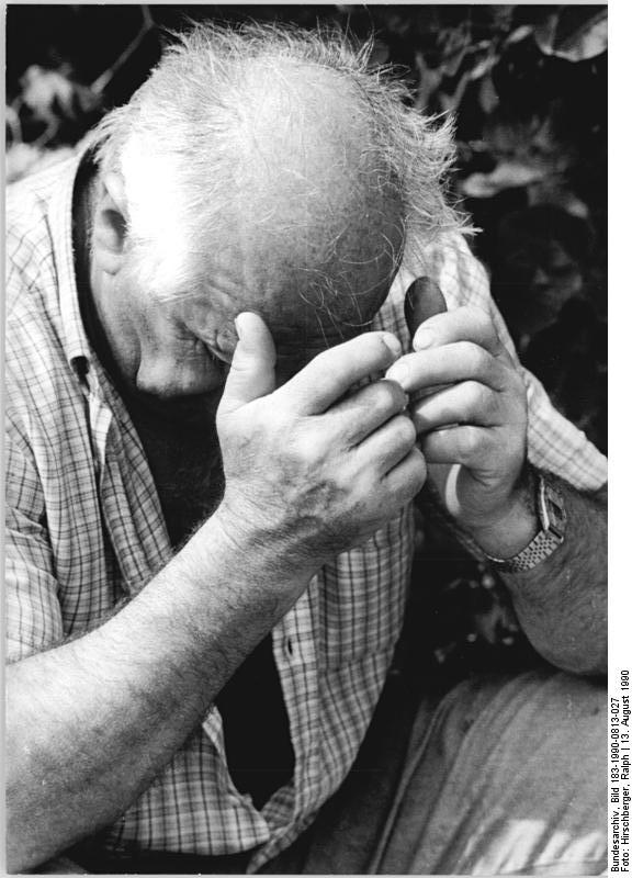 ADN- Ralf Hirschberger 13.8.90-Erfurt: Bauerndemonstration- Mehrere Tausend Bauern aus allen Kreisen Nordthüringens demonstrierten entschieden gegen die katastrophale Lage in der Landwirtschaft. Eine Vielzahl von Agrarbetrieben steht vor dem Ruin.